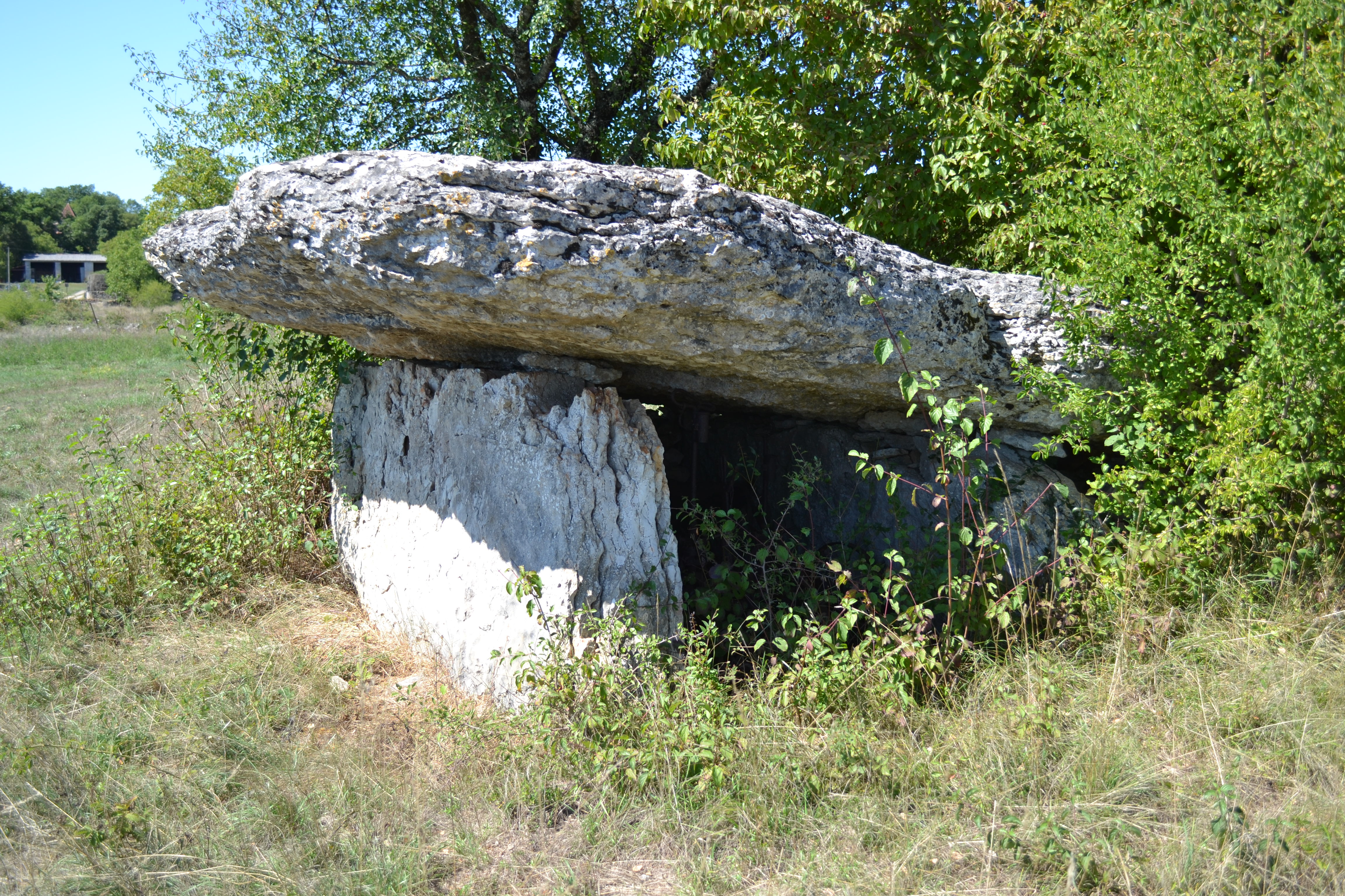 Dolmen de Pajot, Limogne-en-Quercy, Lot, France